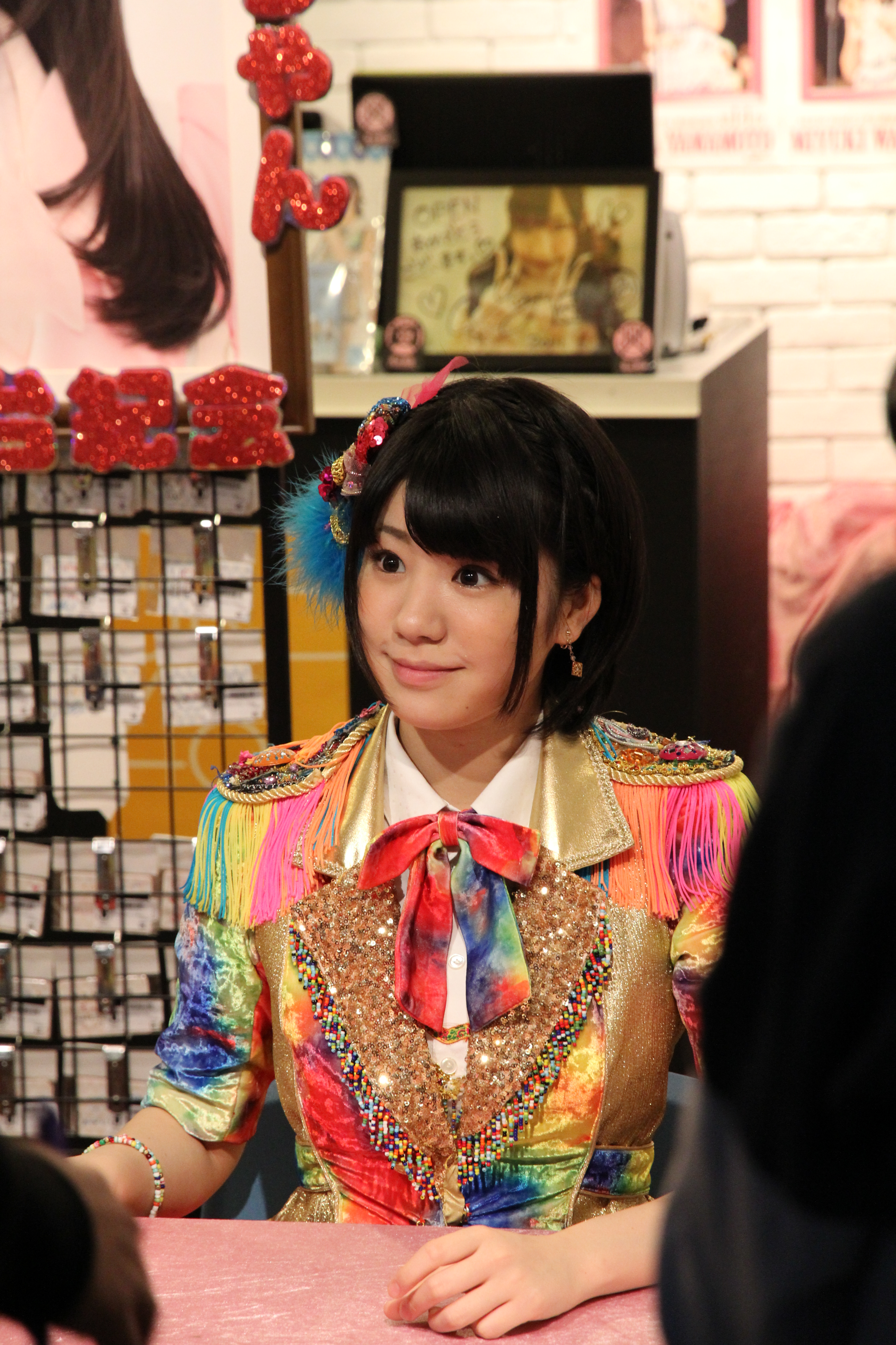 2013-12-21台灣握手會